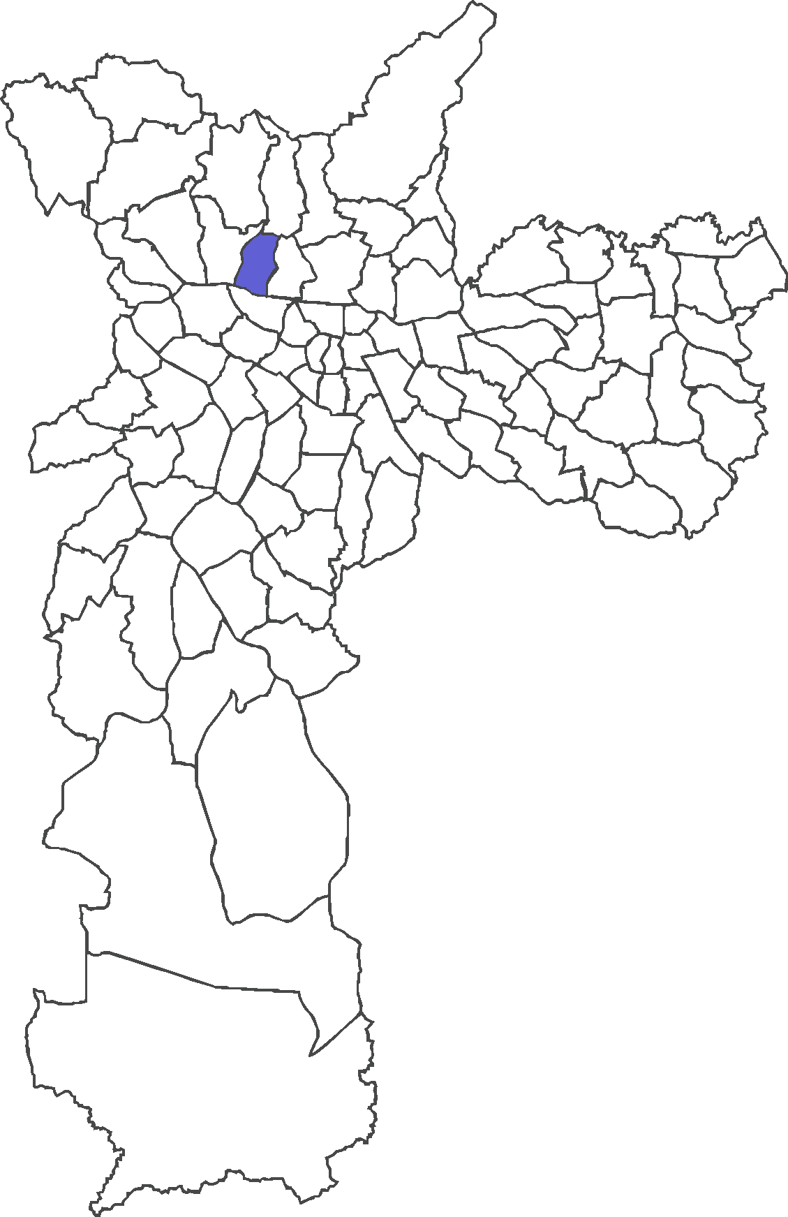 Localização do distrito do Limão no município de São Paulo.